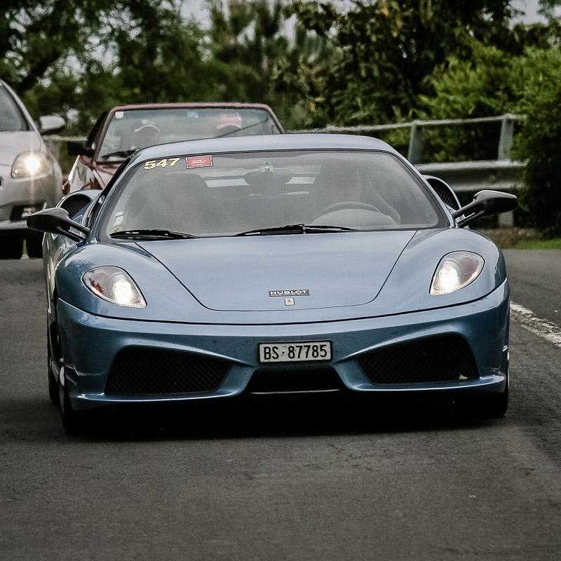 1000 miglia 2012 - SS della Futa . Pianoro (BO)